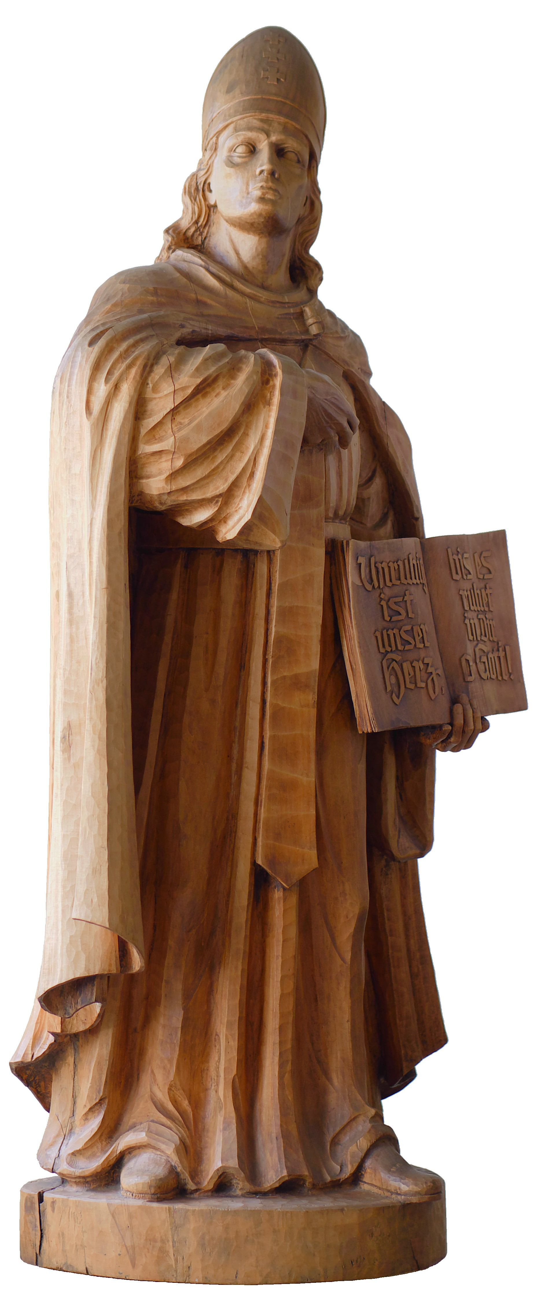 Kloster Sankt Augustinus in Berlin-Lankwitz, Holzfigur Sankt Augustinus